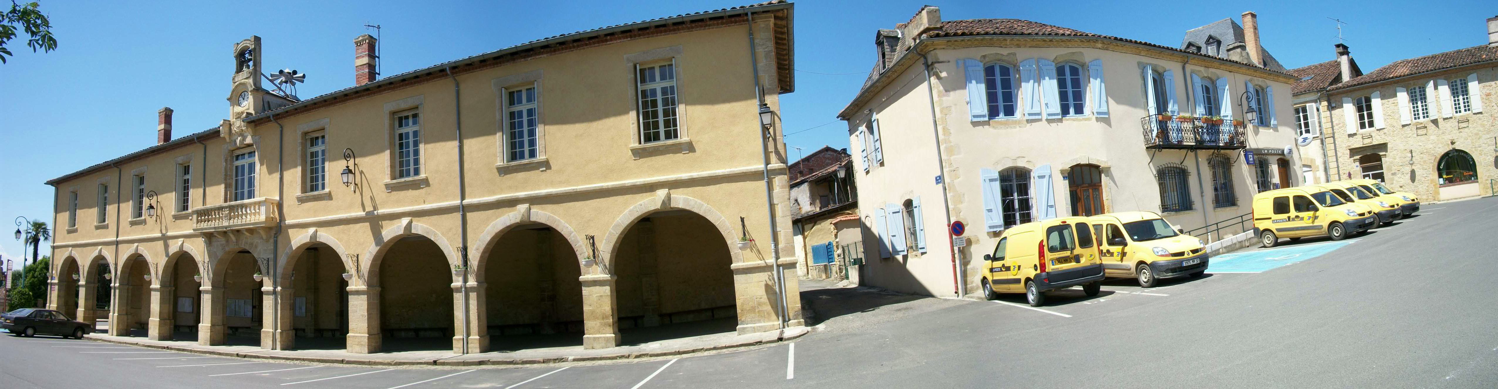 Mairie et Poste d'Aignan (Gers, France).jpg